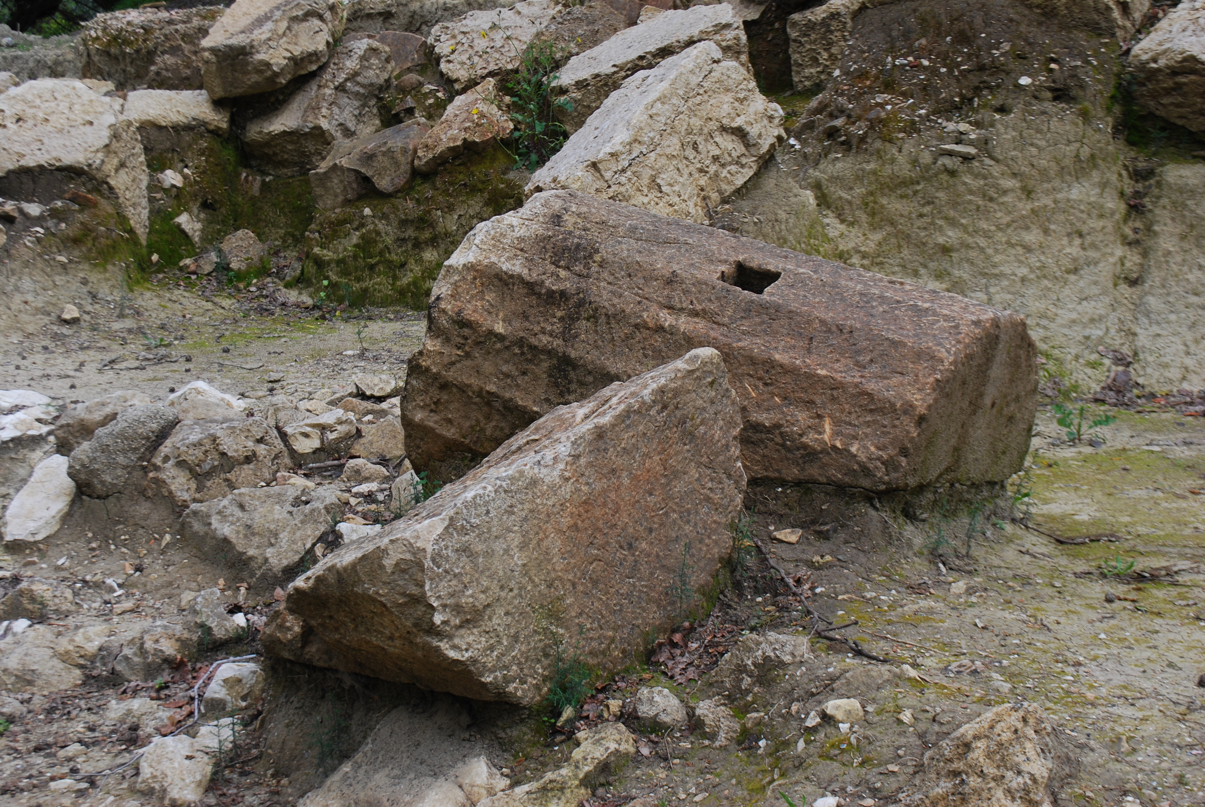 Vue du site archéologique de Paleopoli à Corfou.